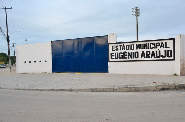 Estádio Municipal Eugênio Araújo - Olindão